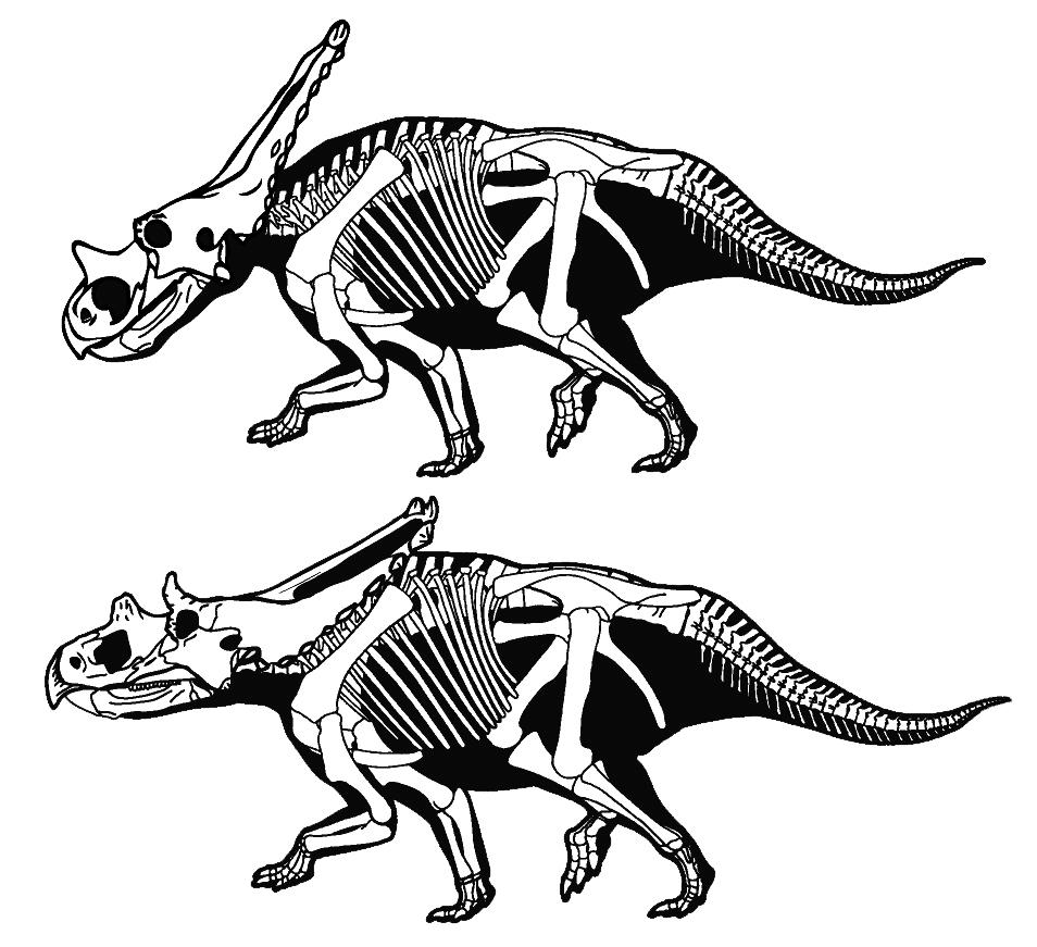 Chasmosaurus belli and russelli skeletal restoration.